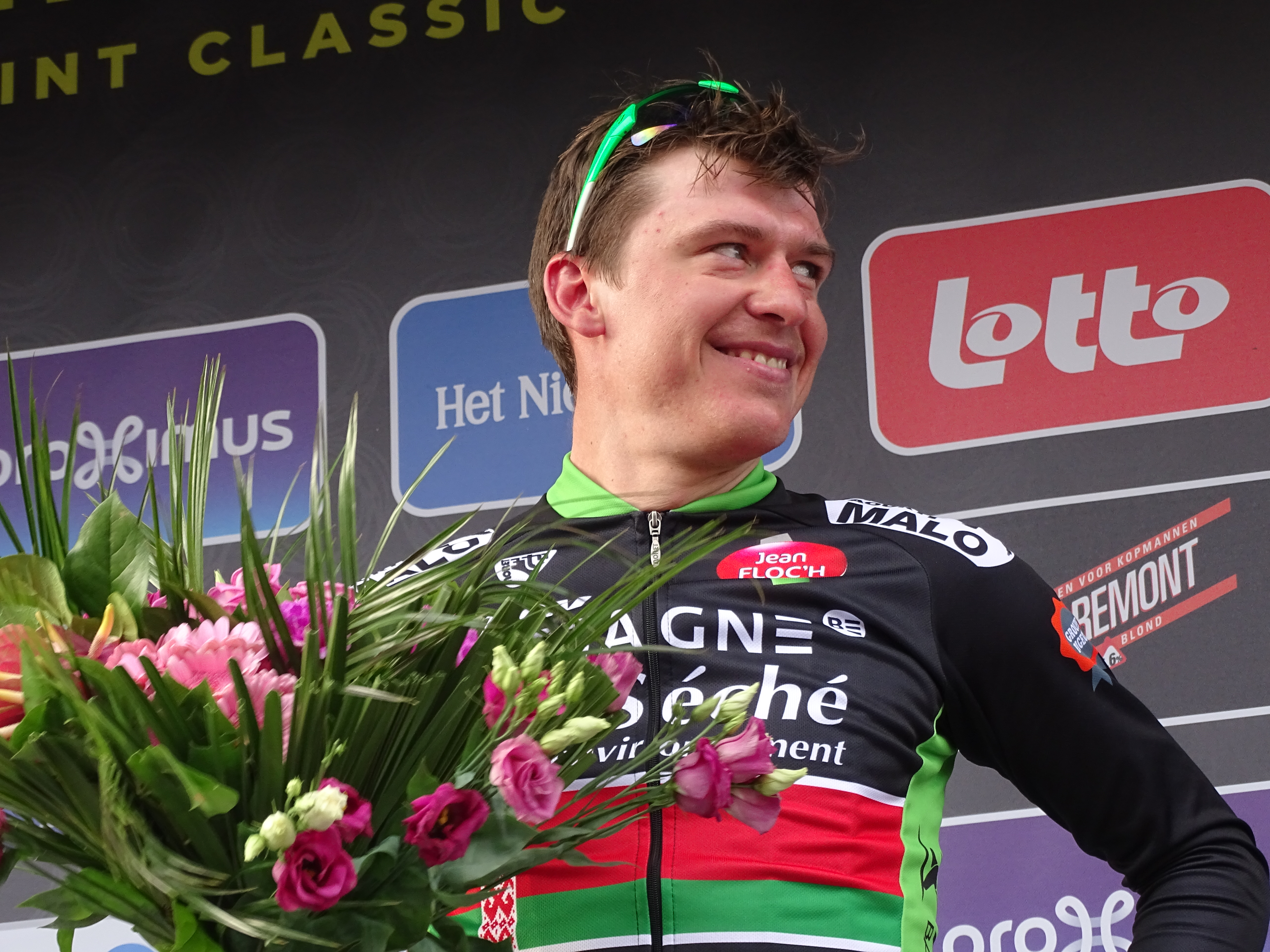 Reportage réalisé le mercredi 8 avril à l'occasion de l'arrivée du Grand Prix de l'Escaut 2015 à Schoten, Belgique.